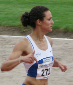 Maral Feizbakhsh beim DLV-Olympia-Testwettkampf 2012 im Sepp-Herberger-Stadion Weinheim.